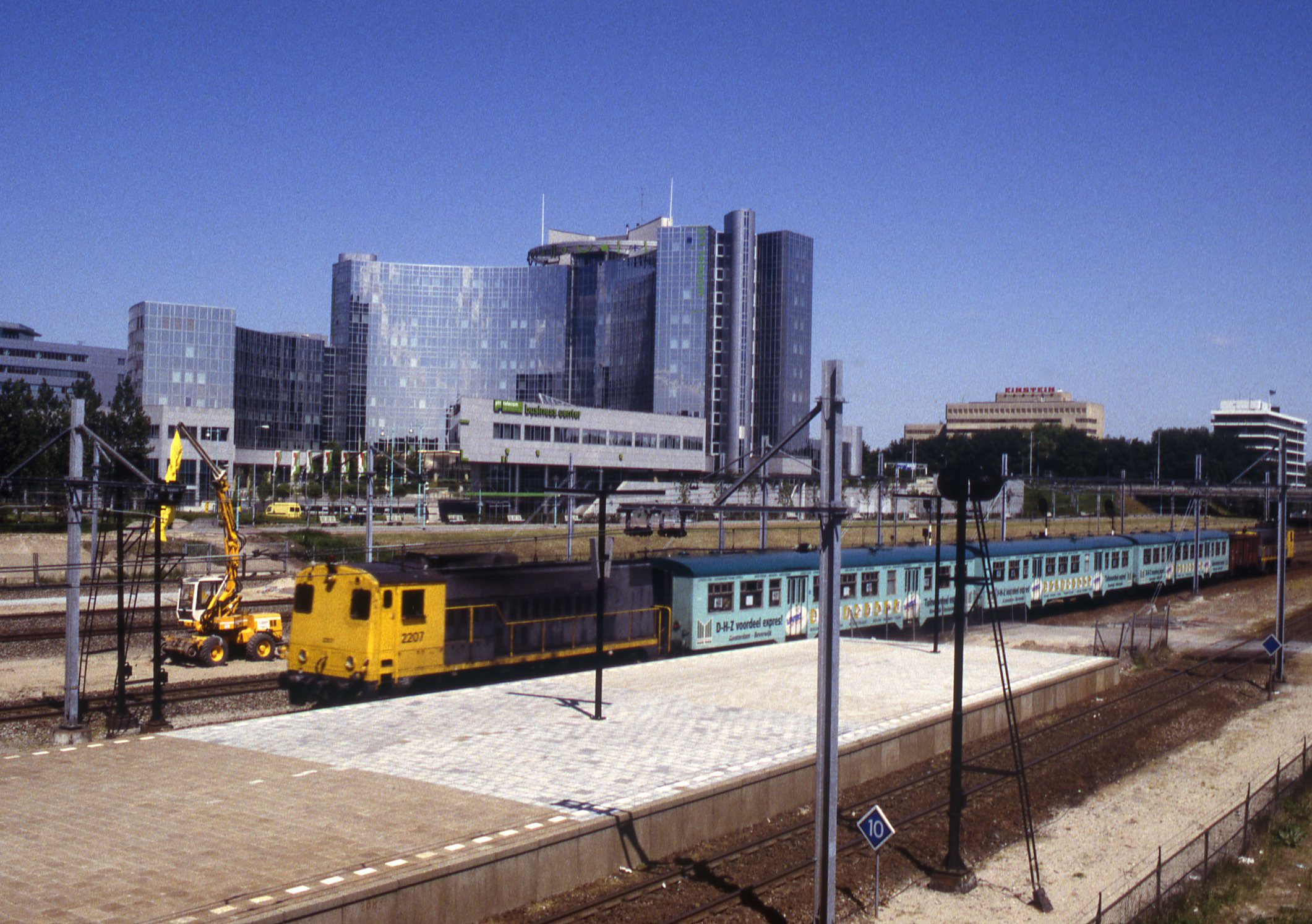 Een Lovers trein in Sloterdijk